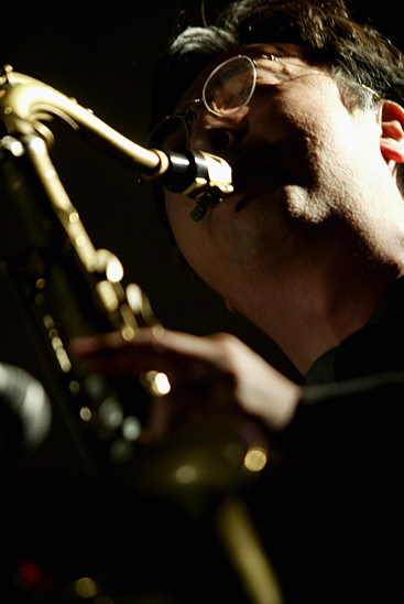 Saxophonist Li Yuan